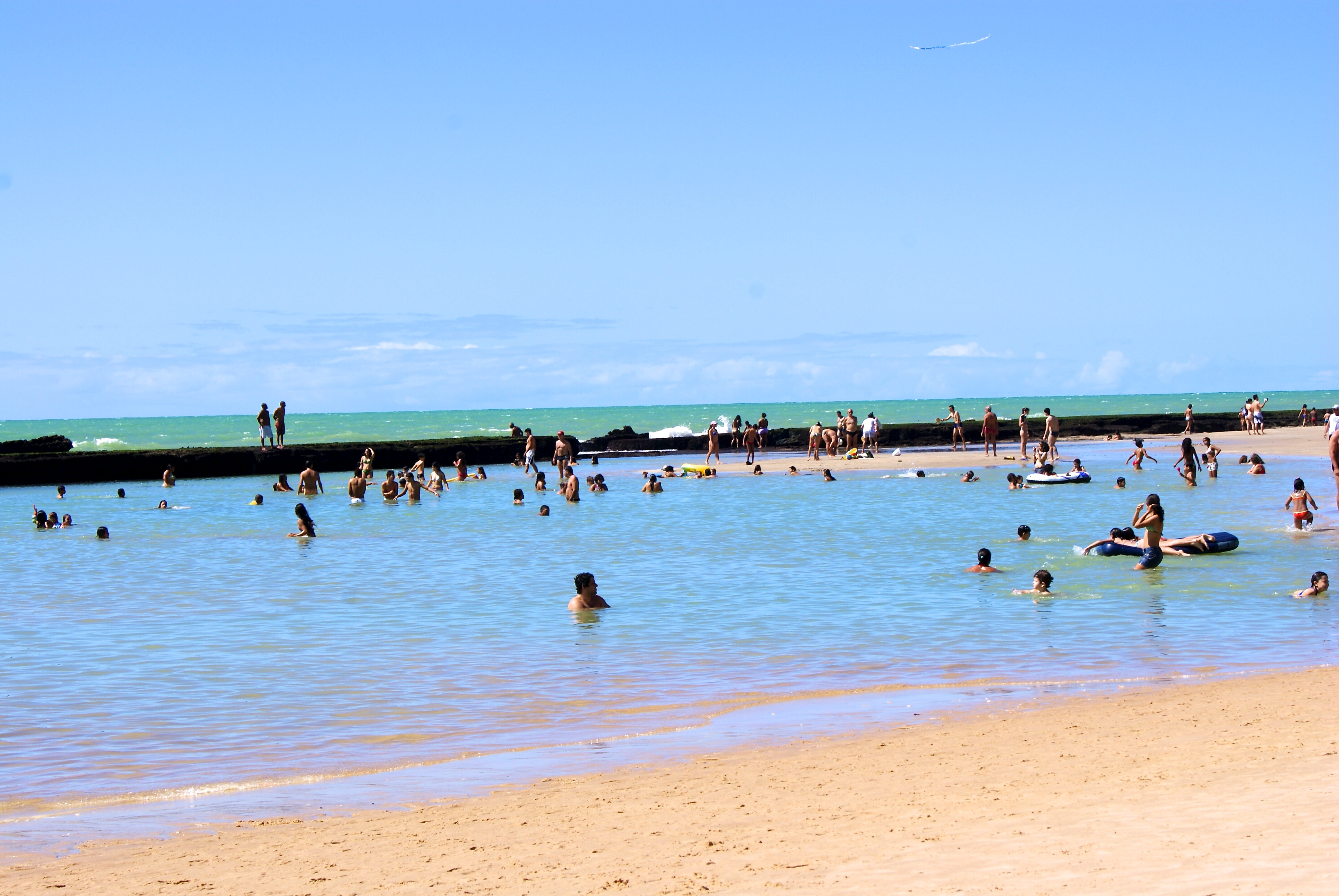 Barreira de recifes naturais da Praia de Boa Viagem - Recife, Pernambuco, Brasil